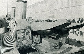 Tubos lanzatorpedos del Torpedero Nº1 durante su visita a Tortosa, 1916